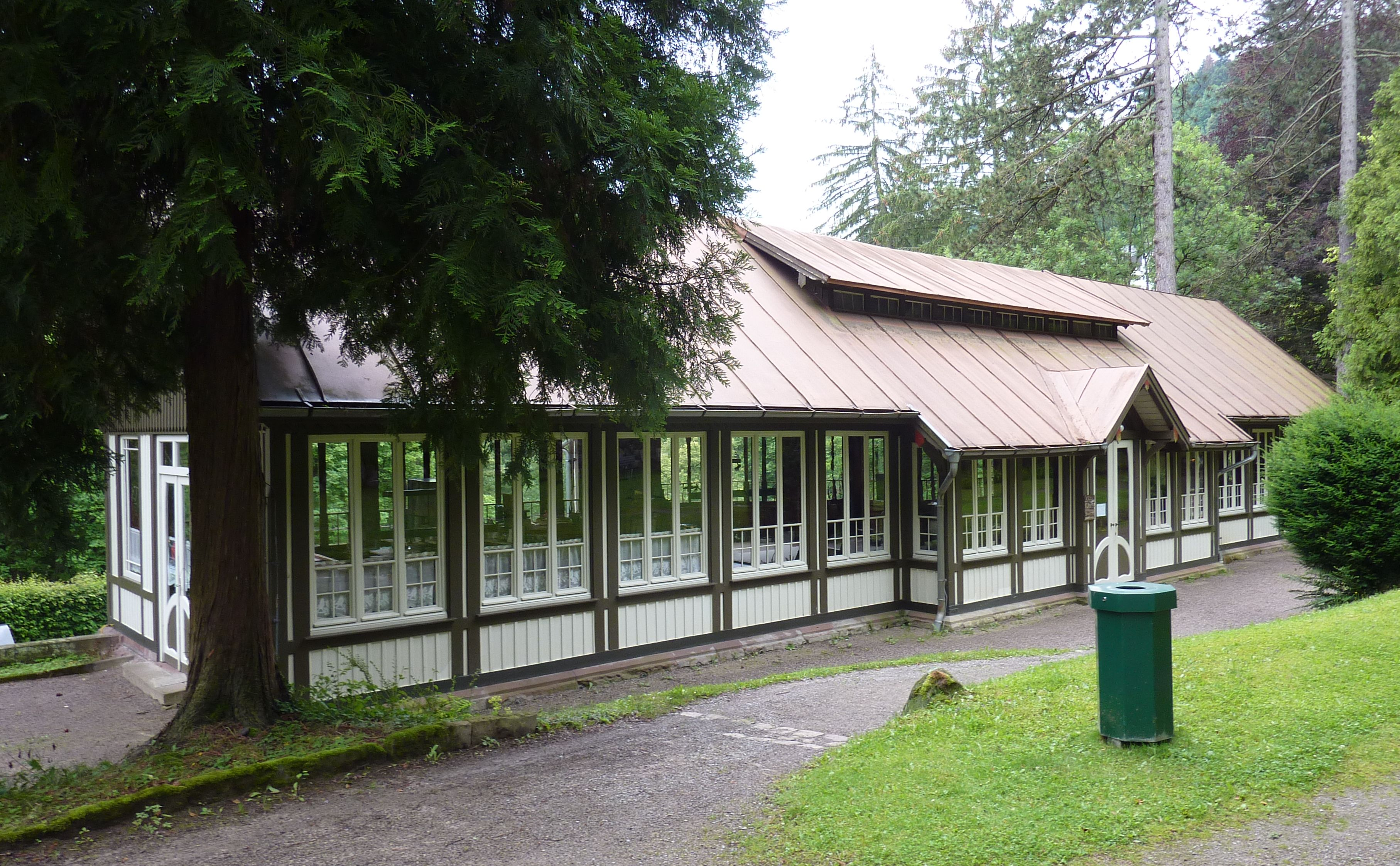 heutige Töpferei in Bad Wildbad, Kurpark